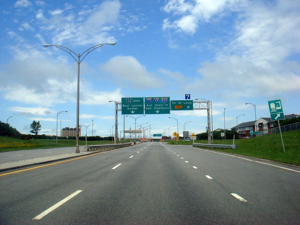 Photo de la route 175, à Québec, Canada.